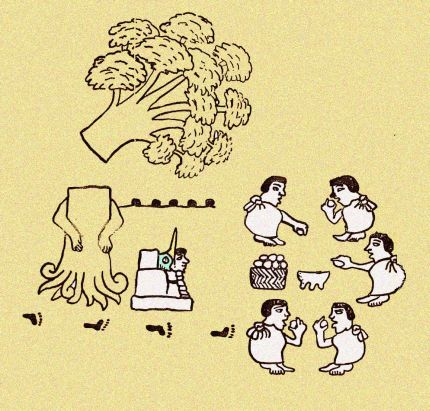 Arbol de Chicomecoatl